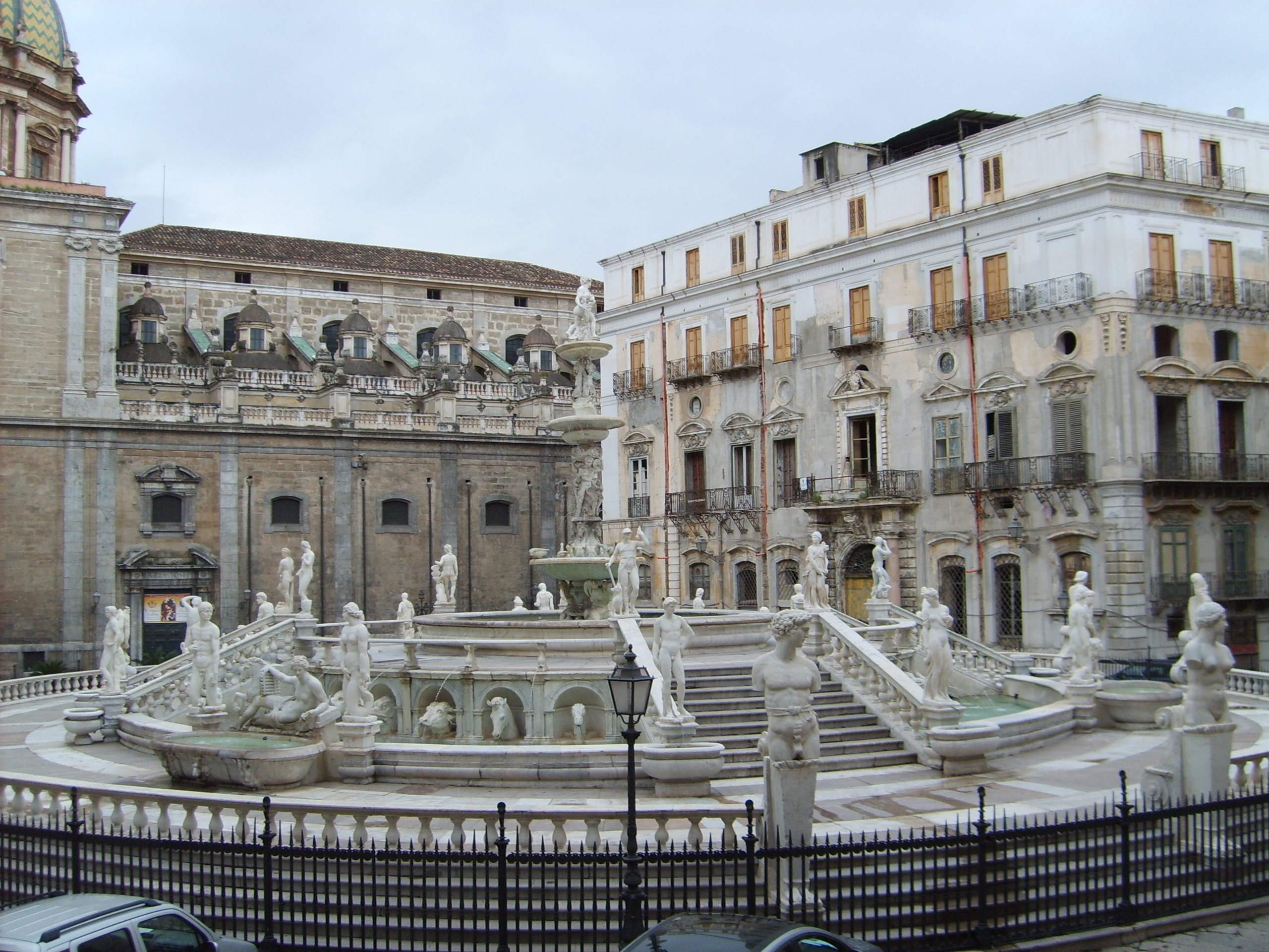 Palermo, veduta della fontana con i "nudi" in piazza della vergogna. Sullo sfondo la barocca chiesa di San Giuseppe dei Teatini (XVII sec.); a destra Palazzo Guggino (XVIII sec.)